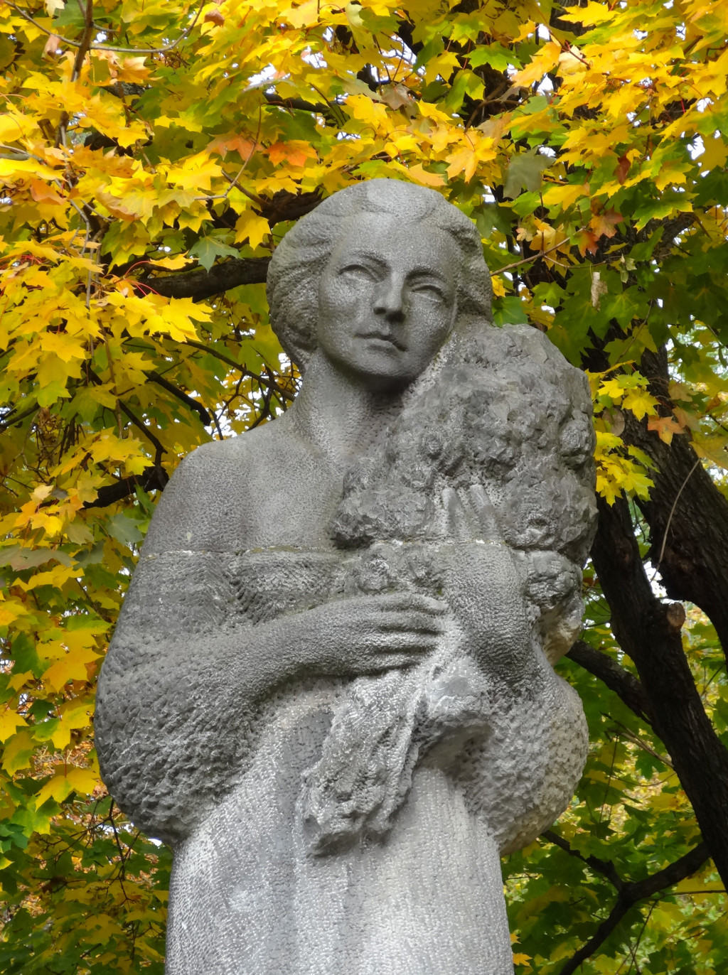 Posąg Grażyny Bacewicz w parku im. Jana Kochanowskiego w pobliżu Filharmonii Pomorskiej w Bydgoszczy